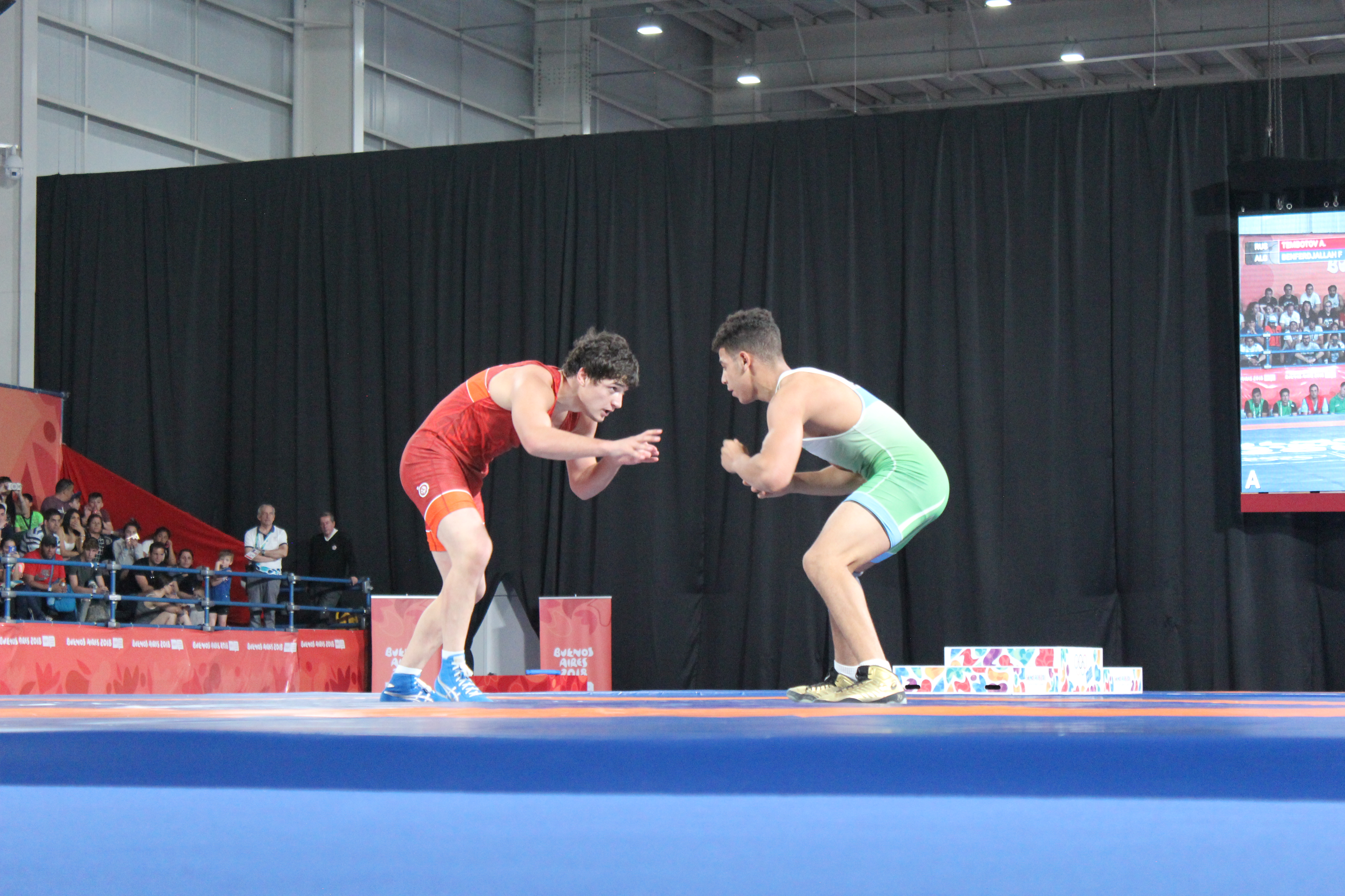 Lucha - estilo libre masculino. JJOO de la Juventud Buenos Aires 2018.